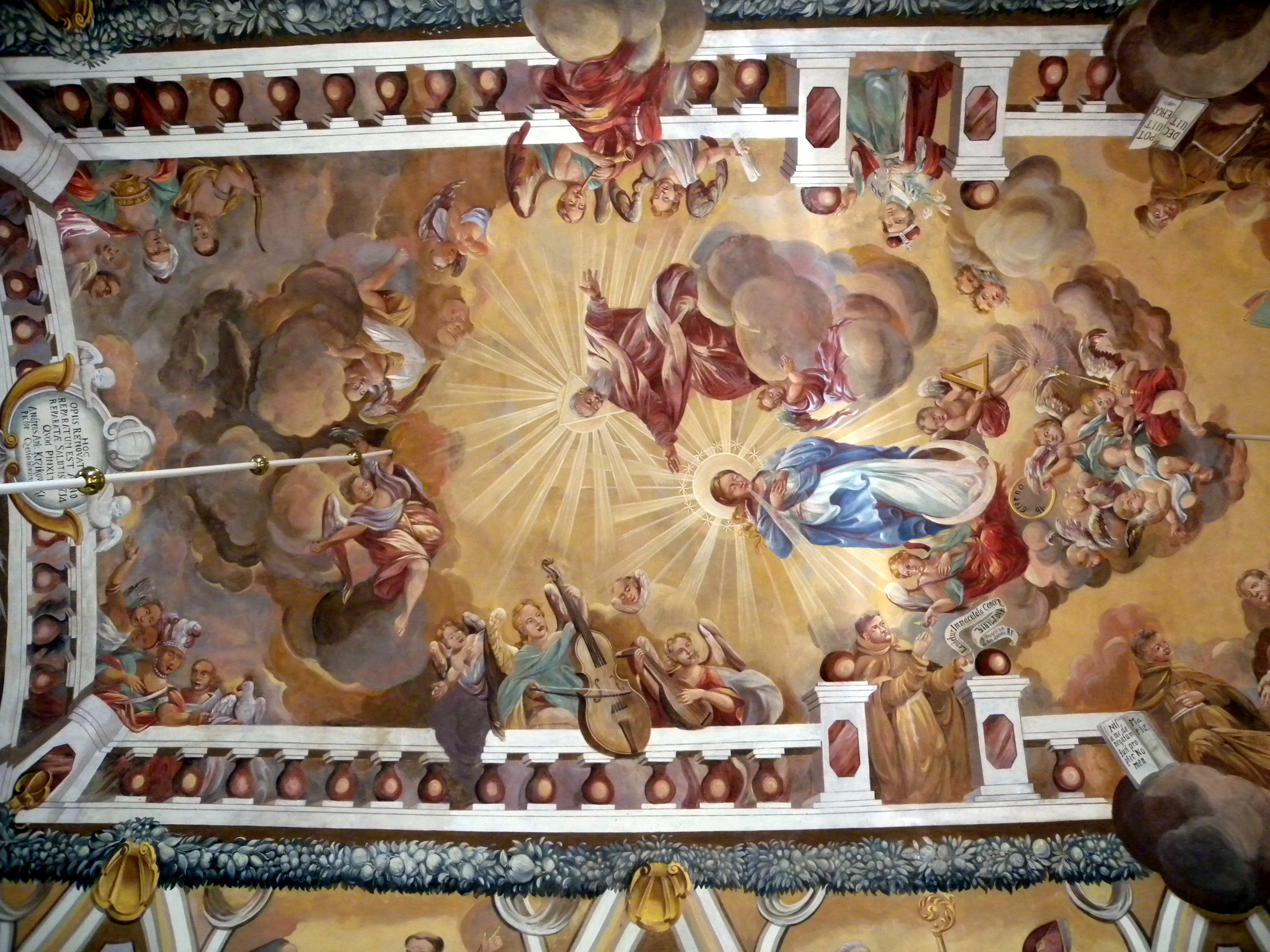 Wieluń ul. Reformatorska 1 - kościół p.w. Zwiastowania NMP, w zespole klasztornym reformatów, mur., 1629, XVIII